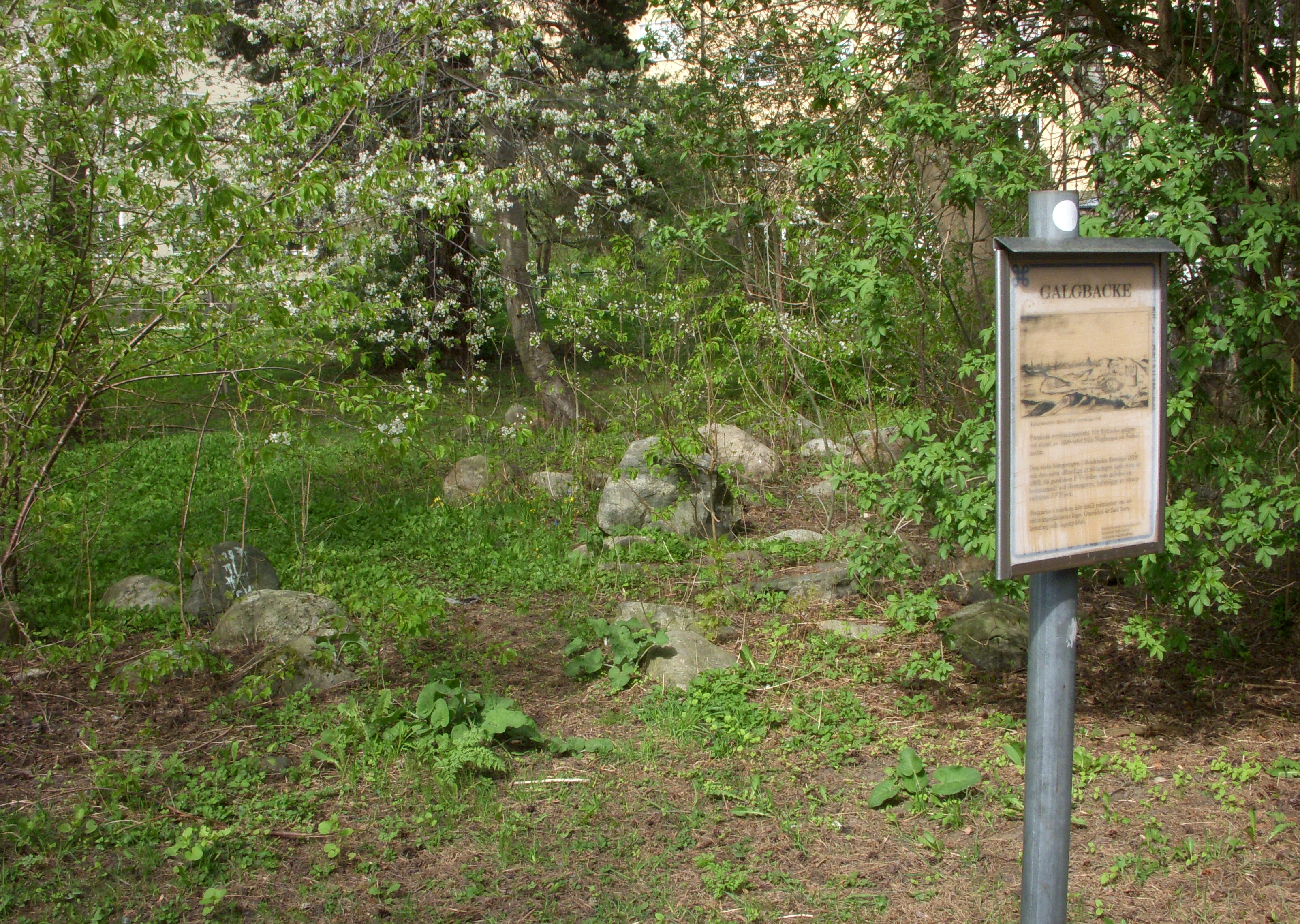 Forntida avrättningsplats: Galgbacken Johanneshov